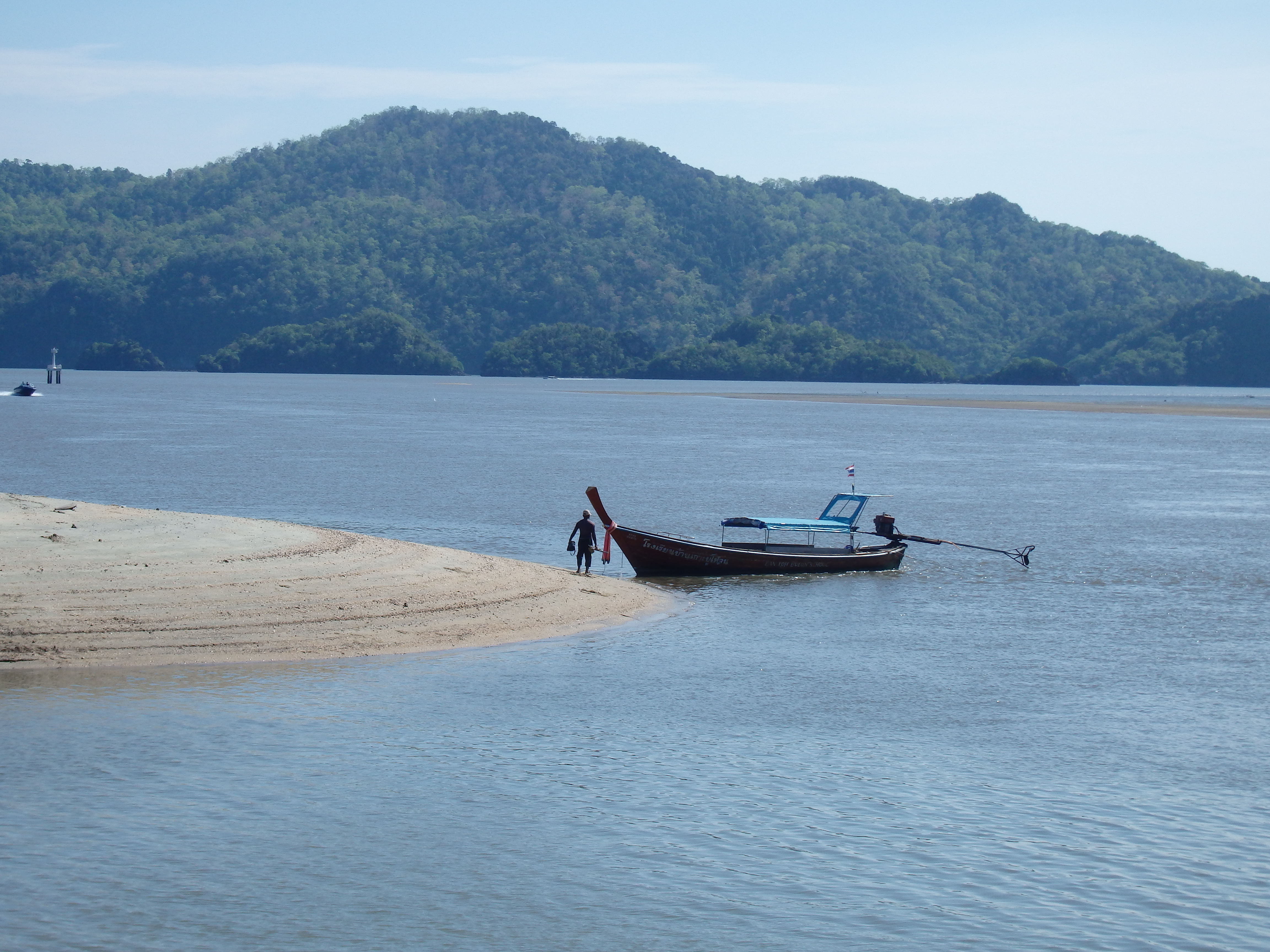 1119/2 4052, Tambon Pak Nam, Amphoe La-ngu, Chang Wat Satun 91110, Thailand